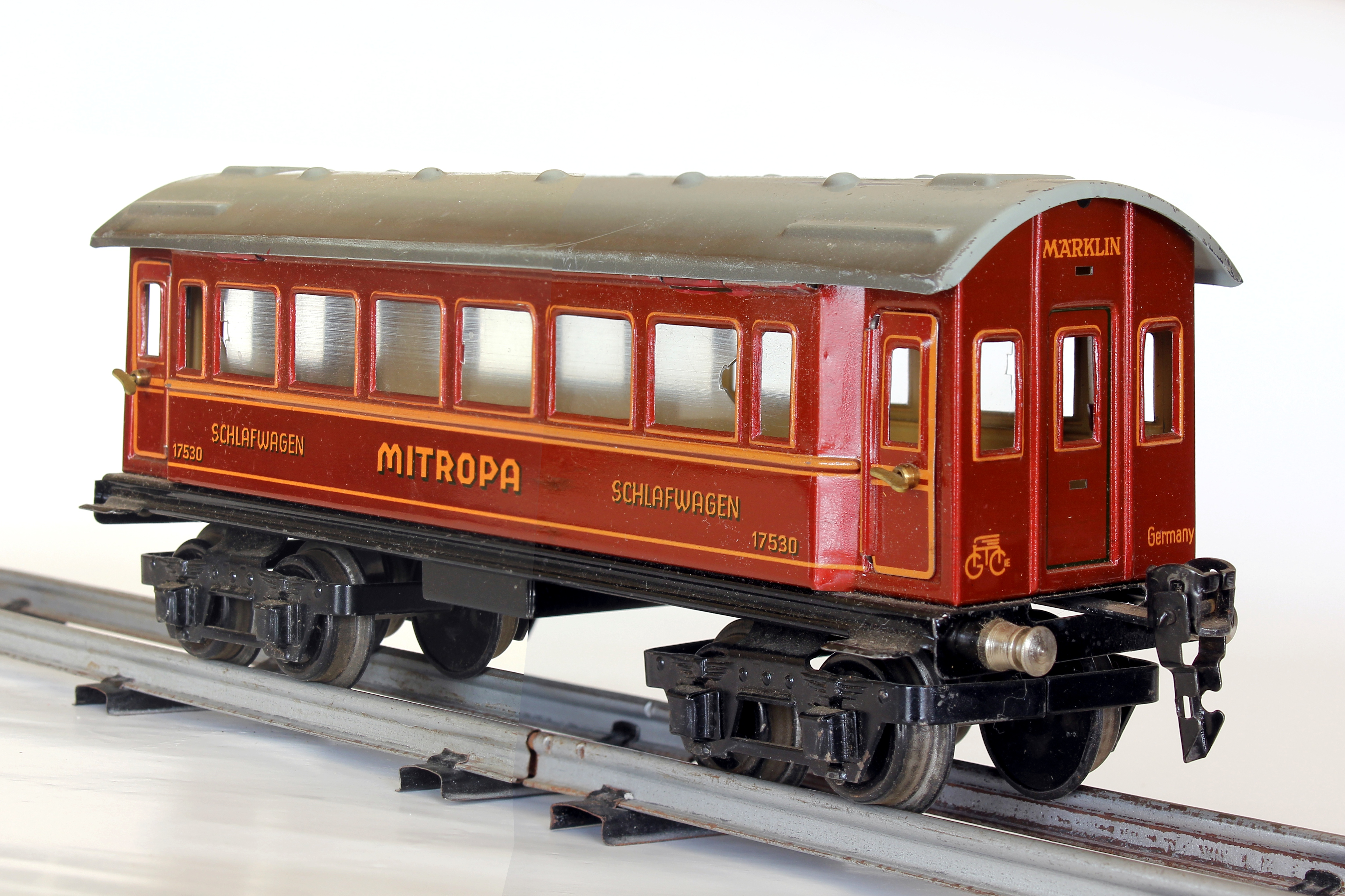 Blechspielzeug-Schlafwagen „Mitropa“, Spur 0, zu öffnende Türen, um 1952, Hersteller: Märklin, Typ 1ST 1753; Verkaufspreis laut handschriftlicher Auszeichnung auf dem Verkaufskarton: 11,00 DM